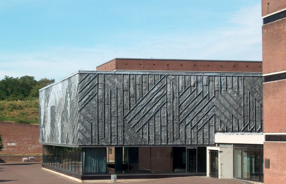 Pädagogisches Zentrum in der Zitadelle